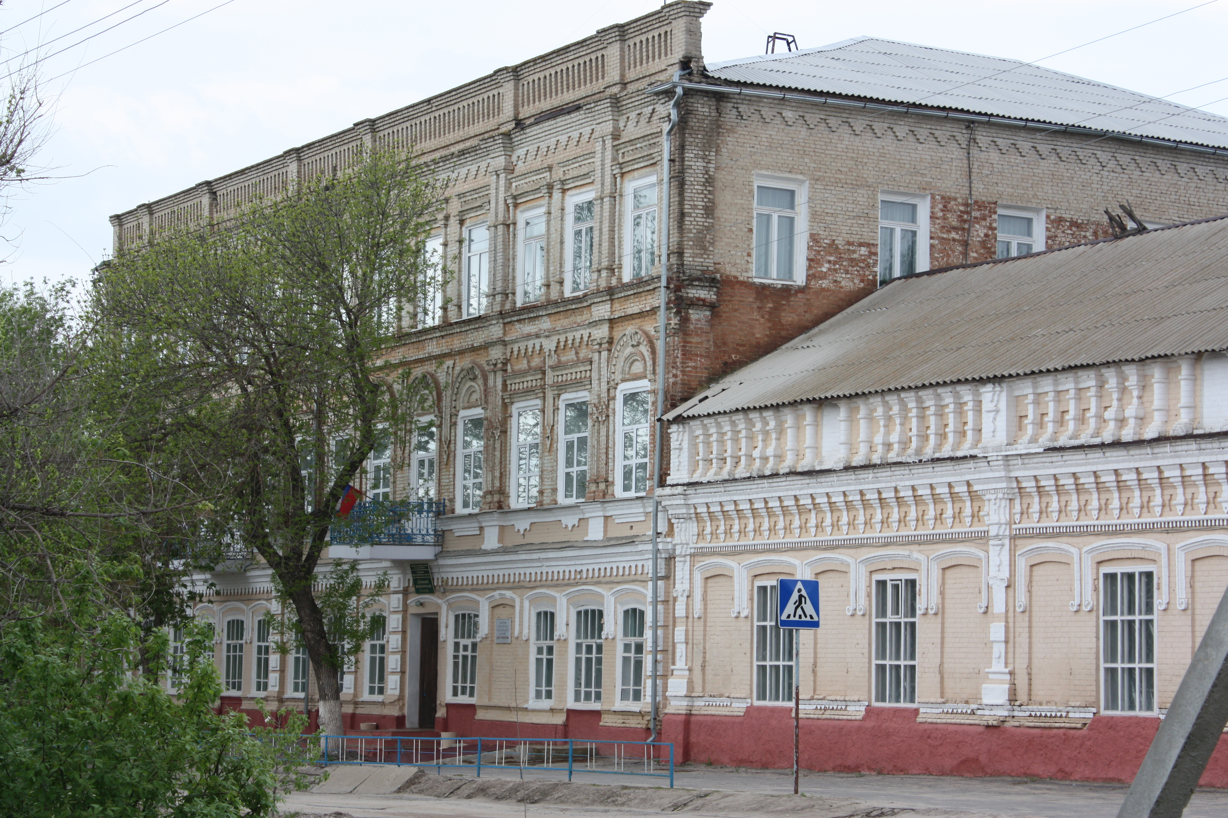 Жилой дом грязева (Волгоградская область, Дубовка, 30-летия победы улица)